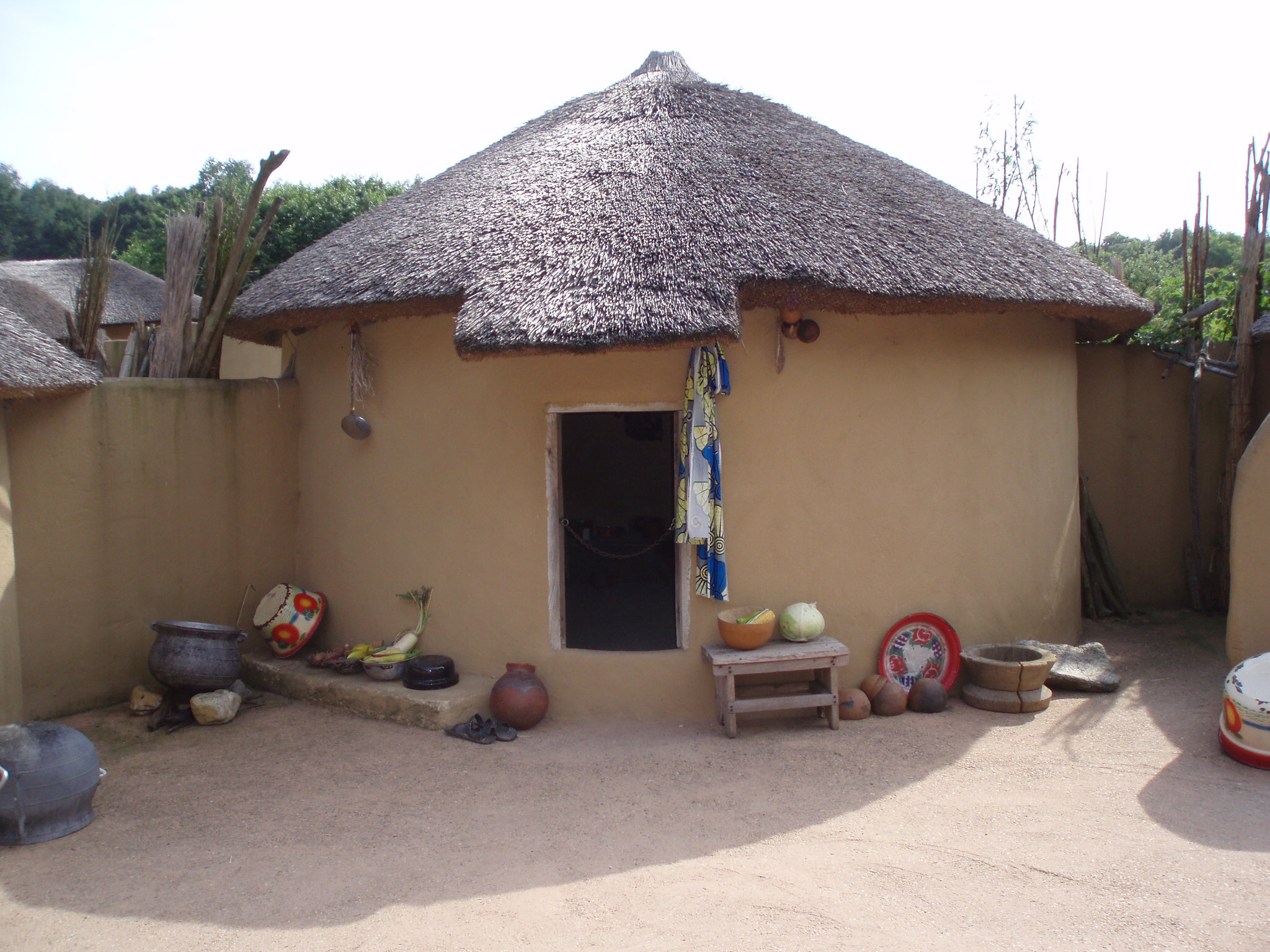 eigen foto (c) looi 2006